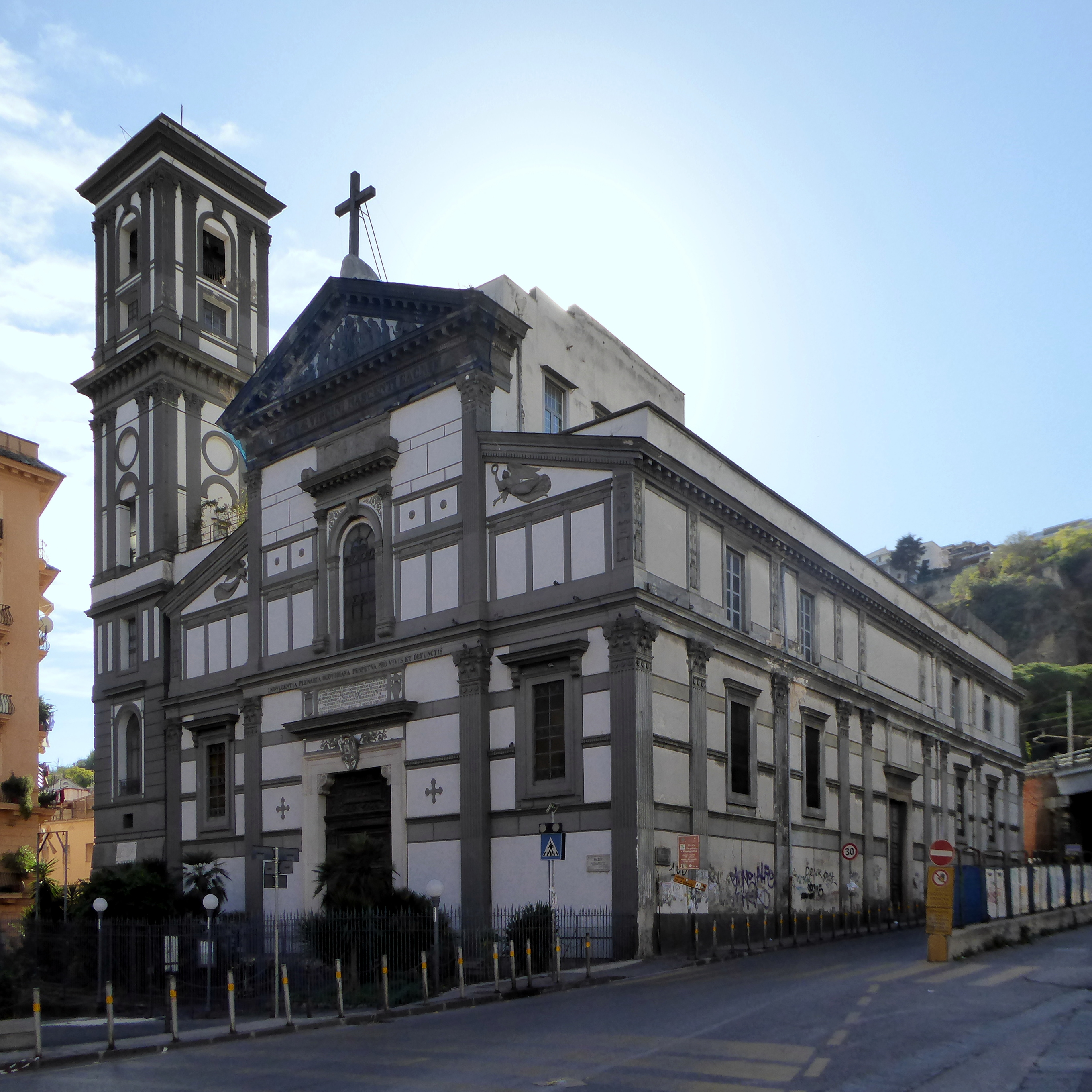 Neapel, Kirche Santa Maria di Piedigrotta von Nordosten.